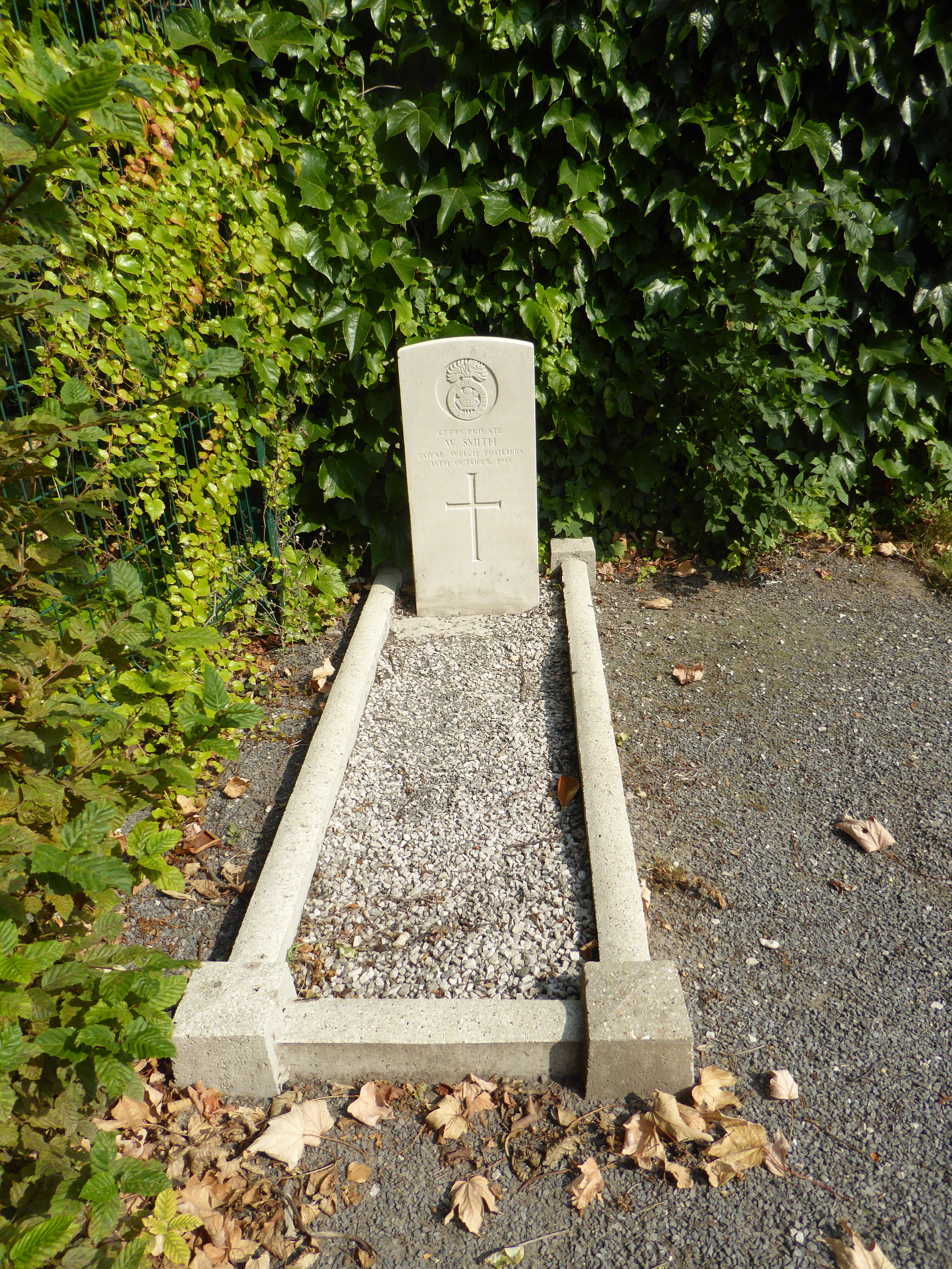 Tombe du Soldat W. Smith du Royal Welsh Fusilier, dans l'enclos de l'église Saint-Sébastien d'Annappes - carré militaire - guerre1914-1918 d'Annappes à Villeneuve-d'Ascq, France